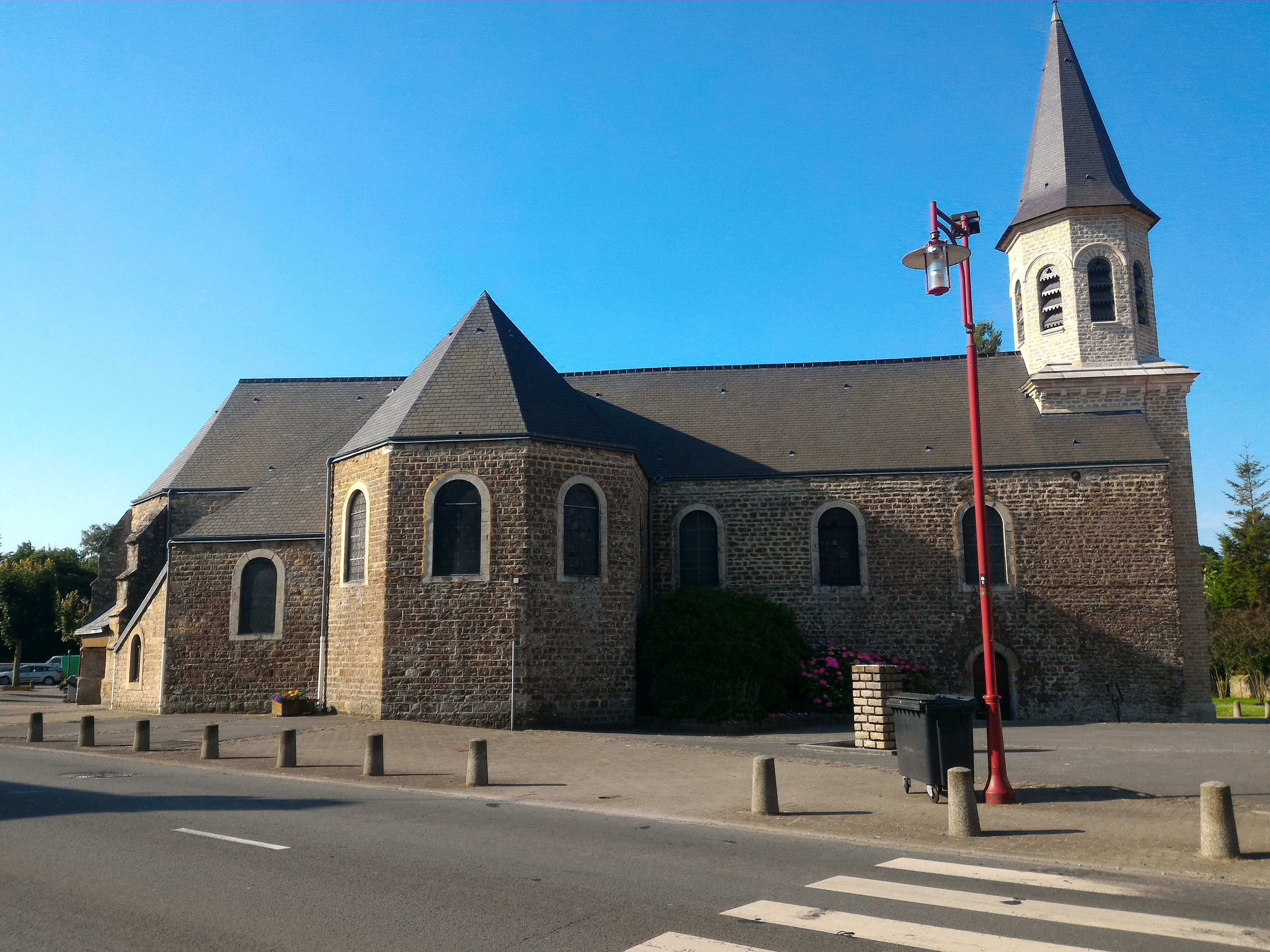 Église de Baincthun (Pas-de-Calais, France)